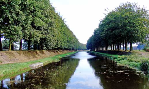 De Schipbeek (ten zuiden van Holten); Categorie:Afbeelding Overijssel